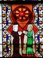 Wappen der pfälzischen Adelsfamilie von Bolanden in der Katharinenkirche Oppenheim